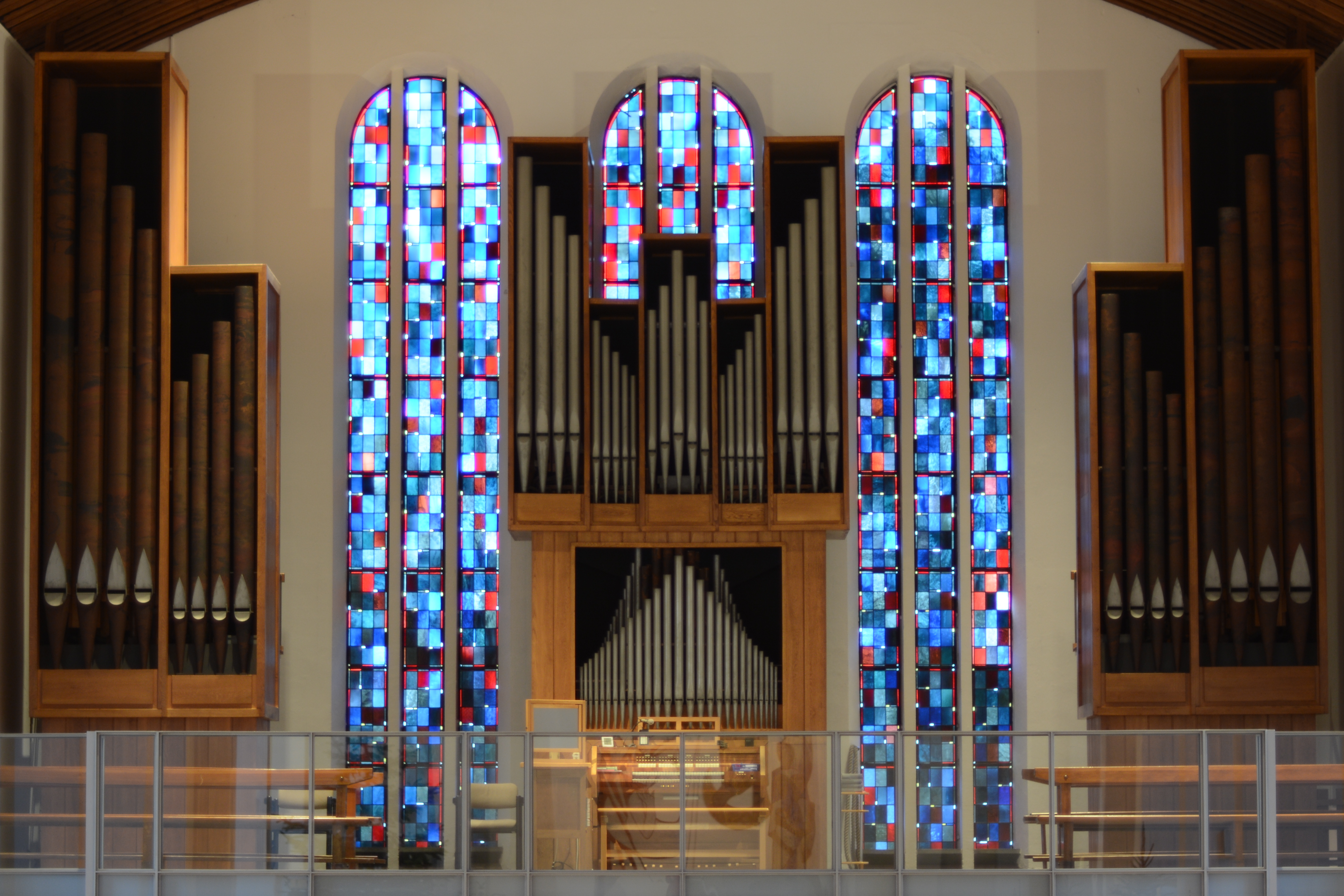 Die Klais-Orgel (II/P 21, Opus 1259, Baujahr 1963) in Maria Königin (Lingen (Ems)). Ausschnittsvergrößerung der Datei File:Maria Königin (Lingen) Orgel.jpg